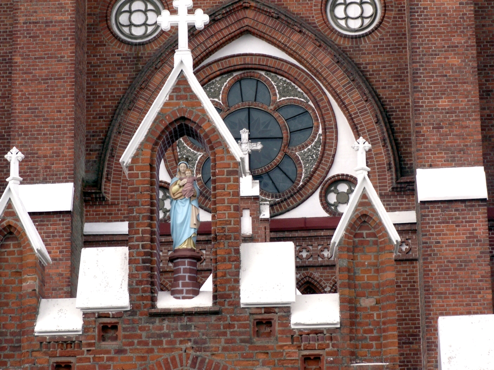 Švėkšnos Šv. apaštalo Jokūbo bažnyčia. Marija